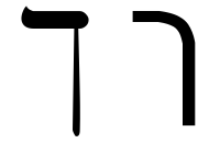 hebrew letter final kaf